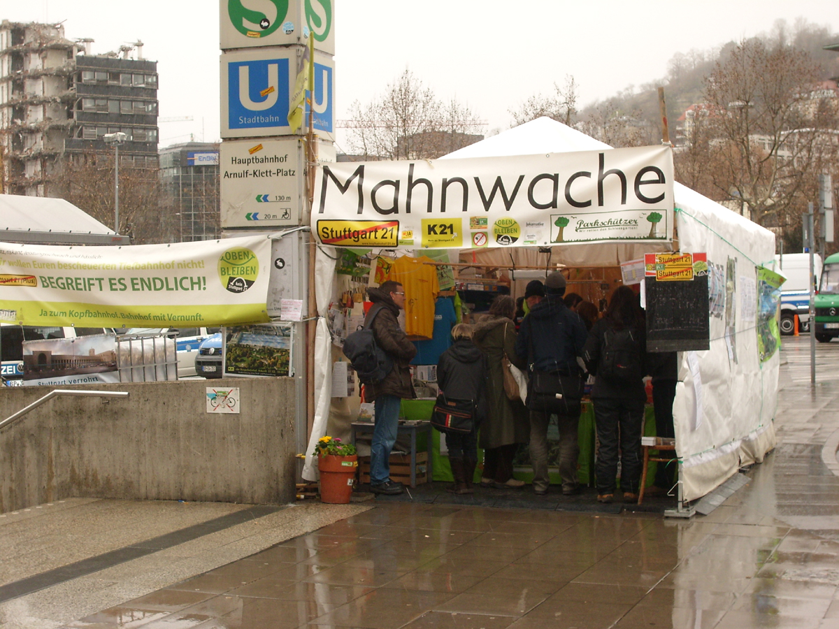 Mahnwache am Eingang des Stuttgarter Bahnhofs